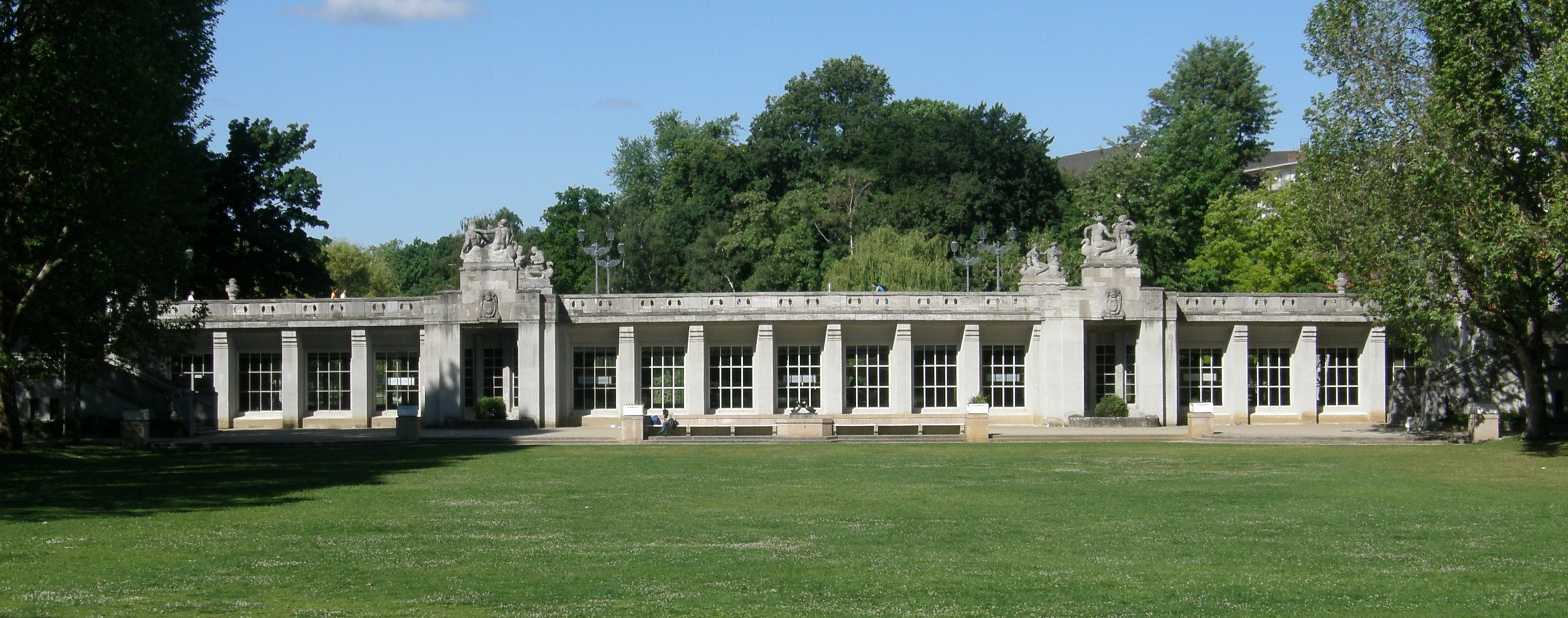 U-Bahnhof Rathaus Schöneberg in Berlin, darüber Carl-Zuckmeyer-Brücke